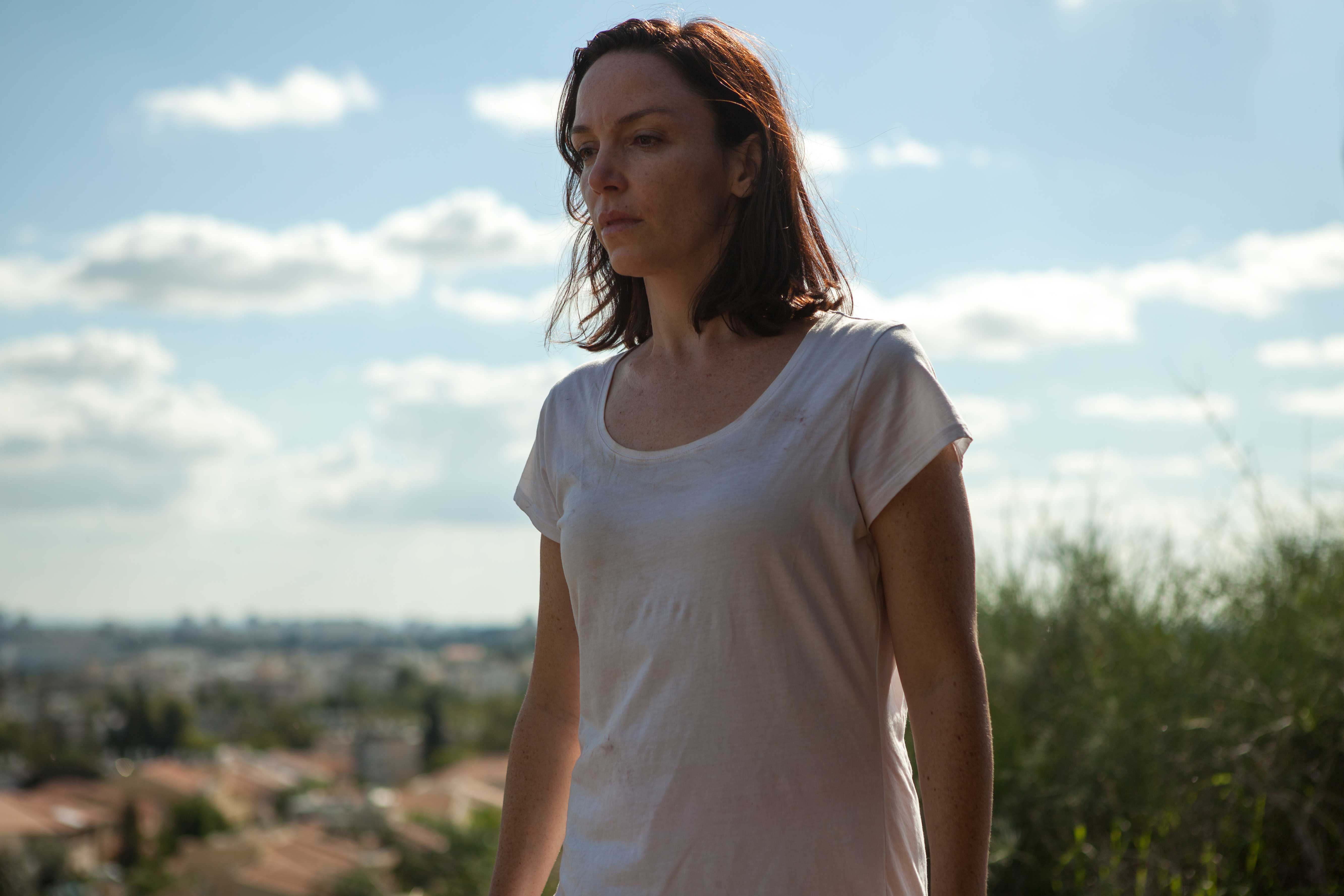 שרון שטרק בסדרה מלאך של אמא